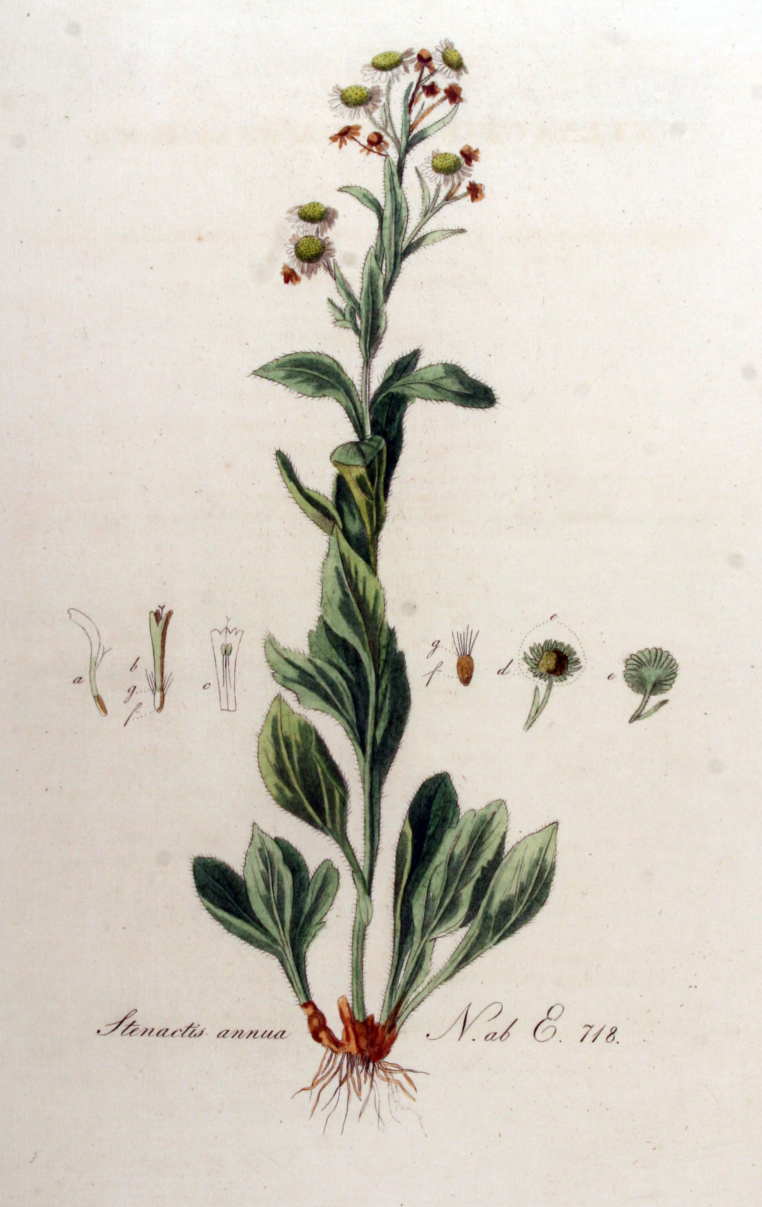 Erigeron annuus (L.) Desf. (Syn. Stenactis annua (L.) Less.)